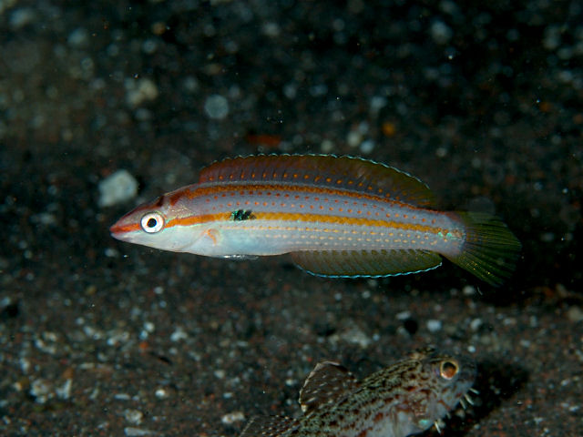 キュウセン Parajulis poecileptera